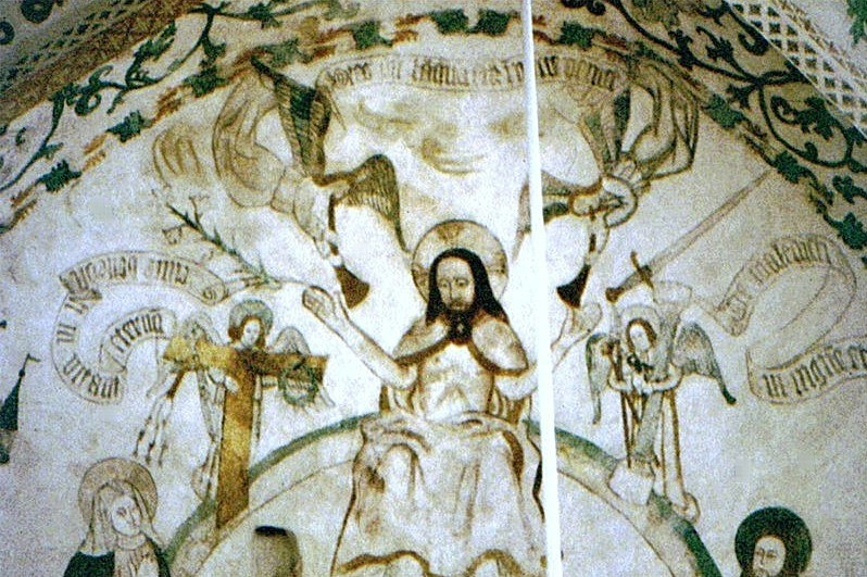 Broager Kirke.